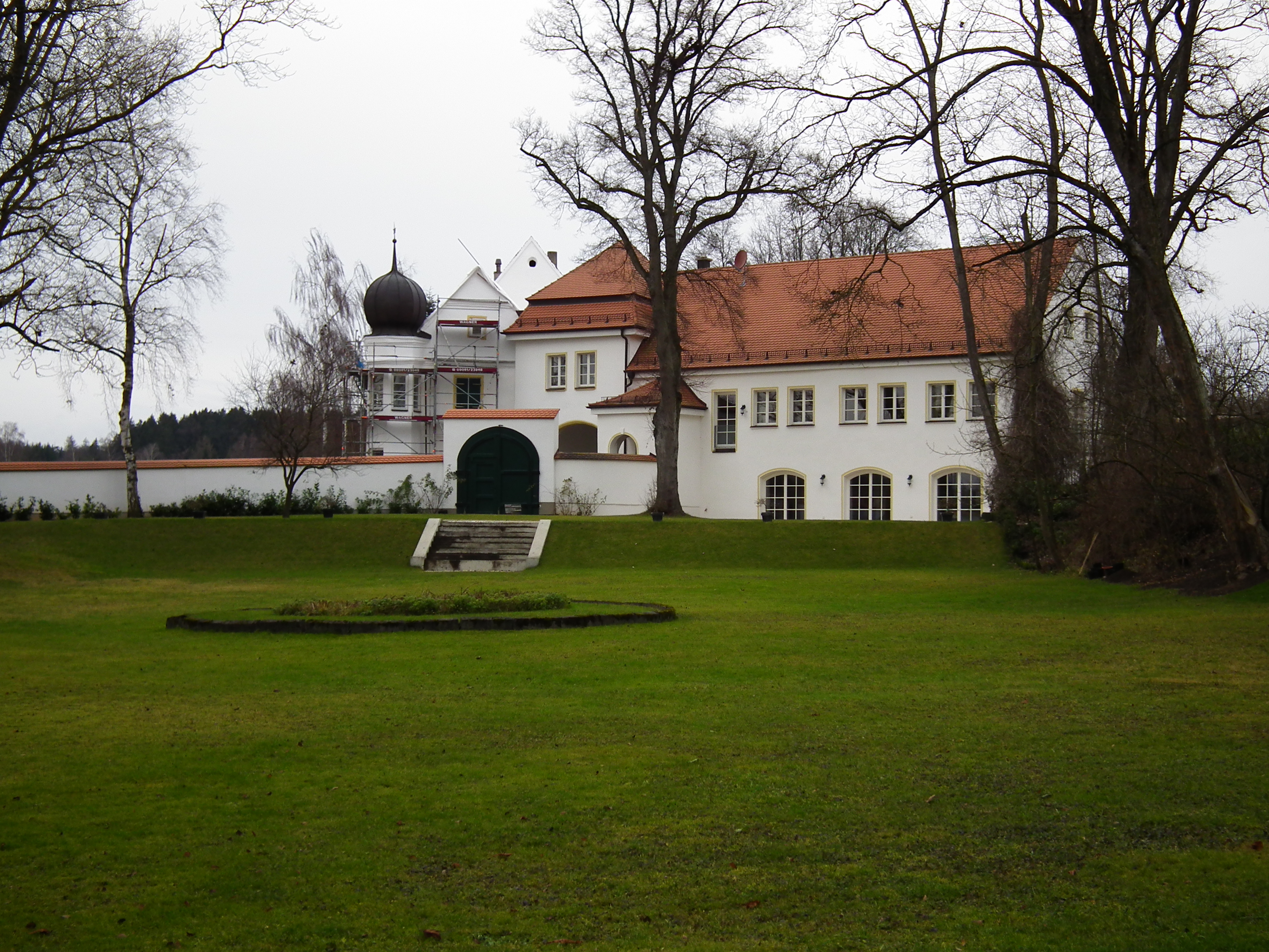 Schloß Otting (Bayern, Deutschland)